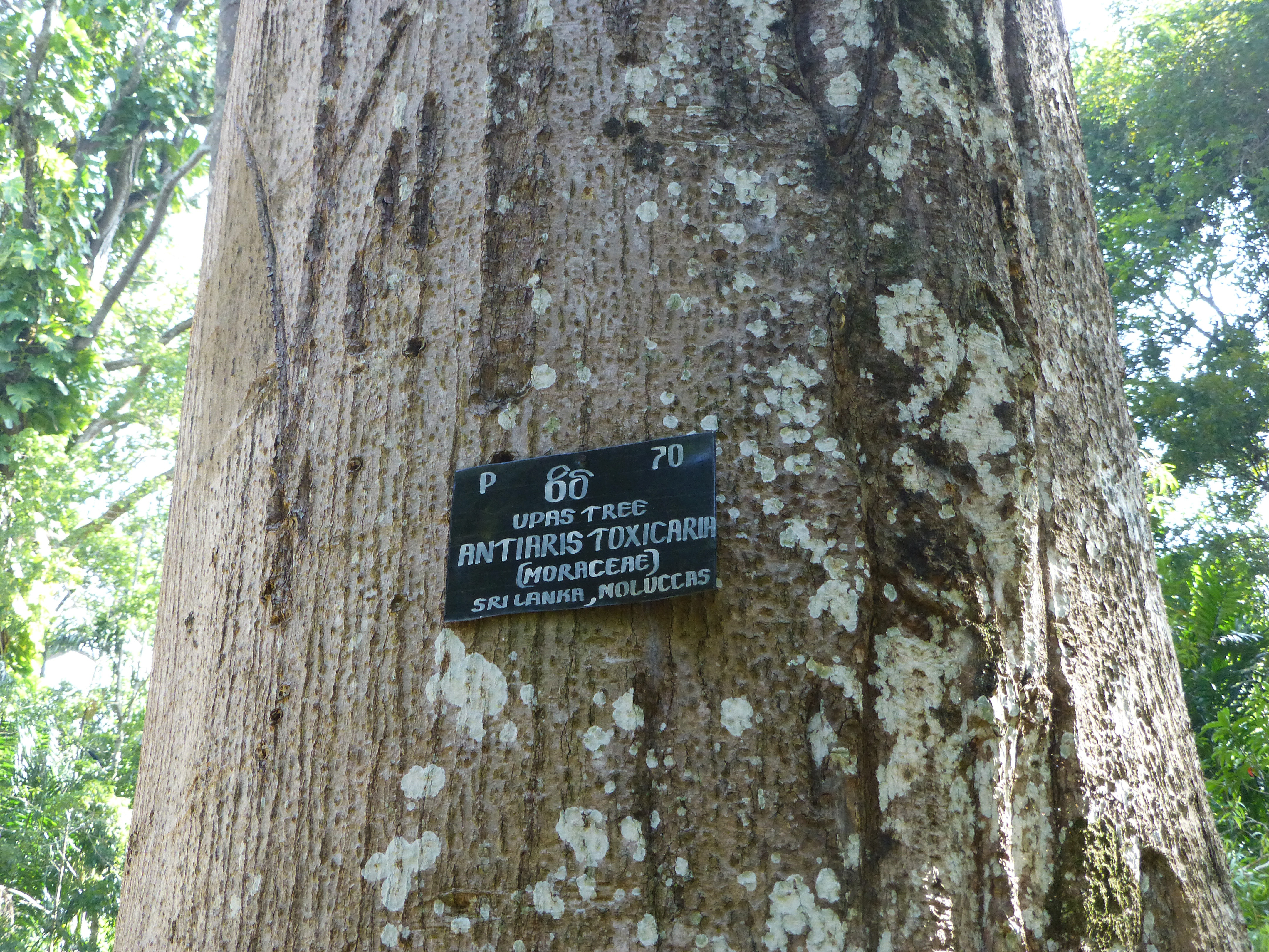 Upas tree (Antiaris toxicaria) au Jardin botanique de Kandy (Sri Lanka). Origine : Sri Lanka, Moluques.